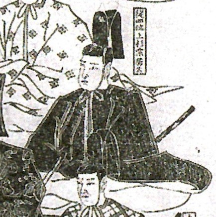 上杉宗房の肖像。